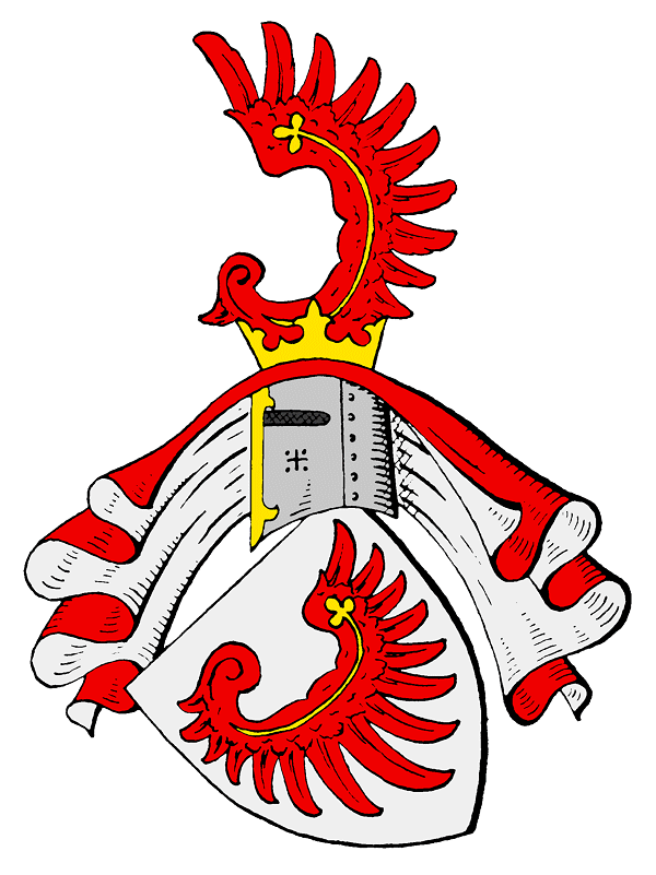 Wappen der von Hodenberg